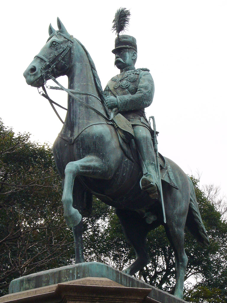 小松宮彰仁親王像、撮影地-恩賜上野公園（東京都台東区）